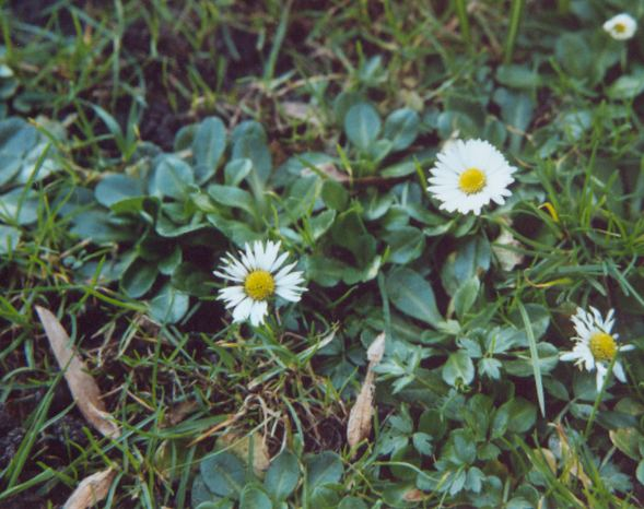 Madeliefje, eigen foto. hierbij vrij gegeven voor GNU/FDL